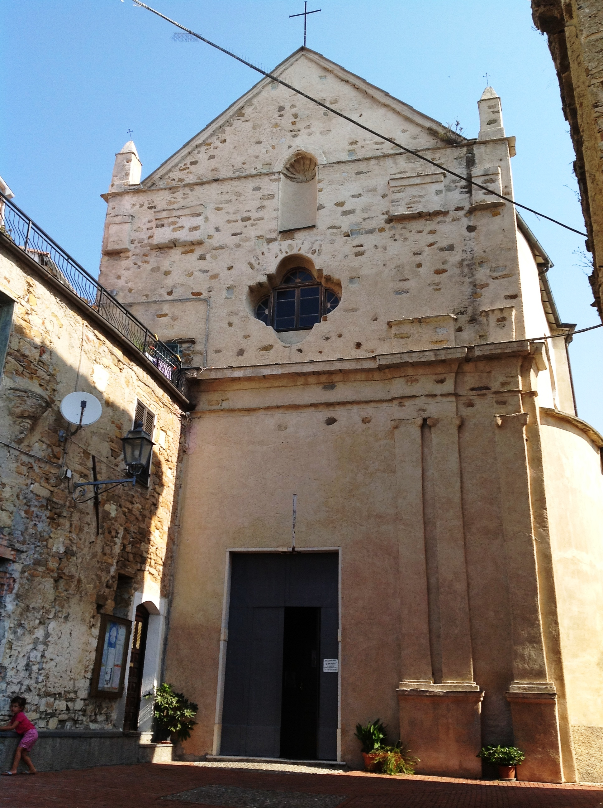 Costarainera